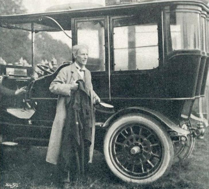 Le Professeur Hubert von Herkomer, à la Herkomer-Konkurrenz d'août 1905.